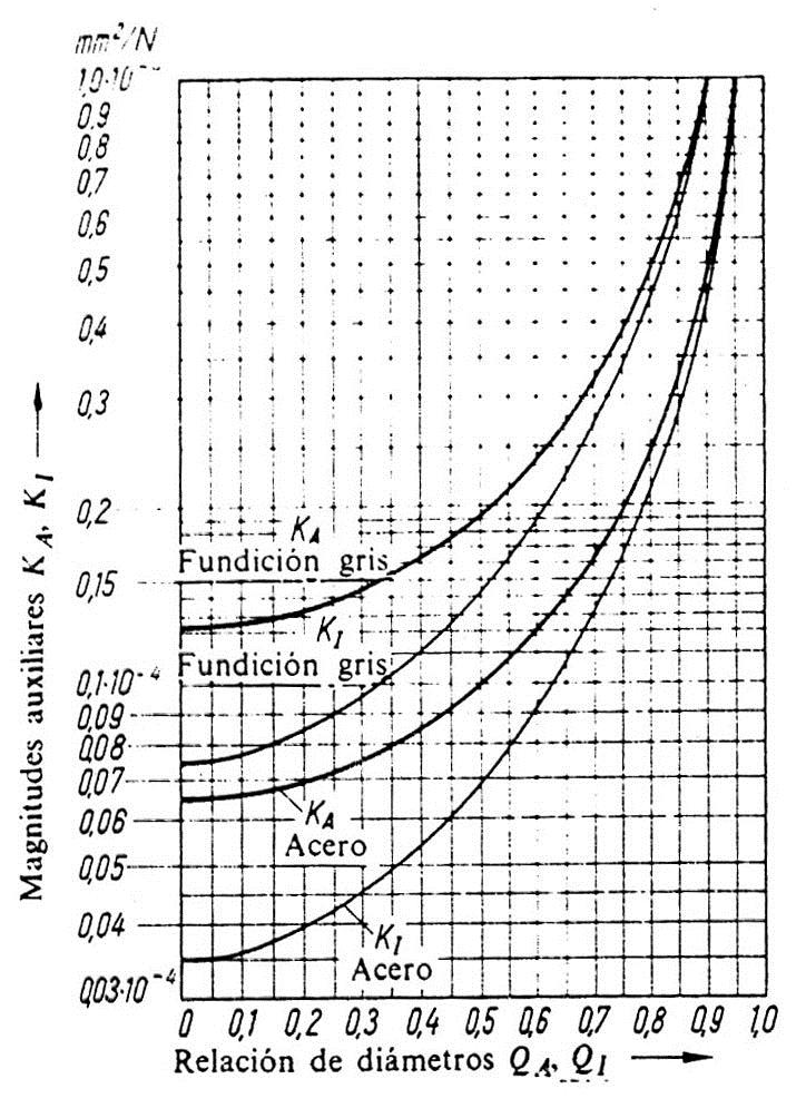 formulas para agujero